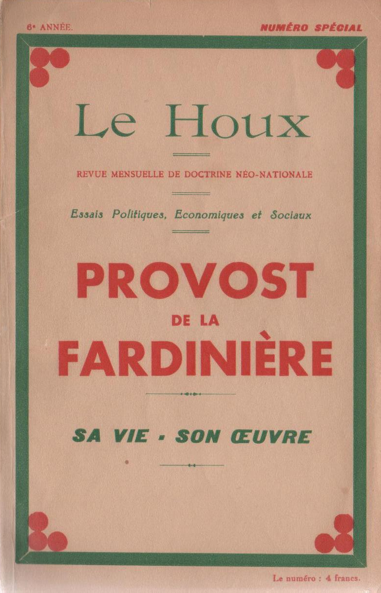 Henri Provost de la Fardinière - Hors Série du Houx fac similé 1937